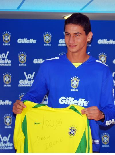 Jogador Paulo Henrique em 2010.